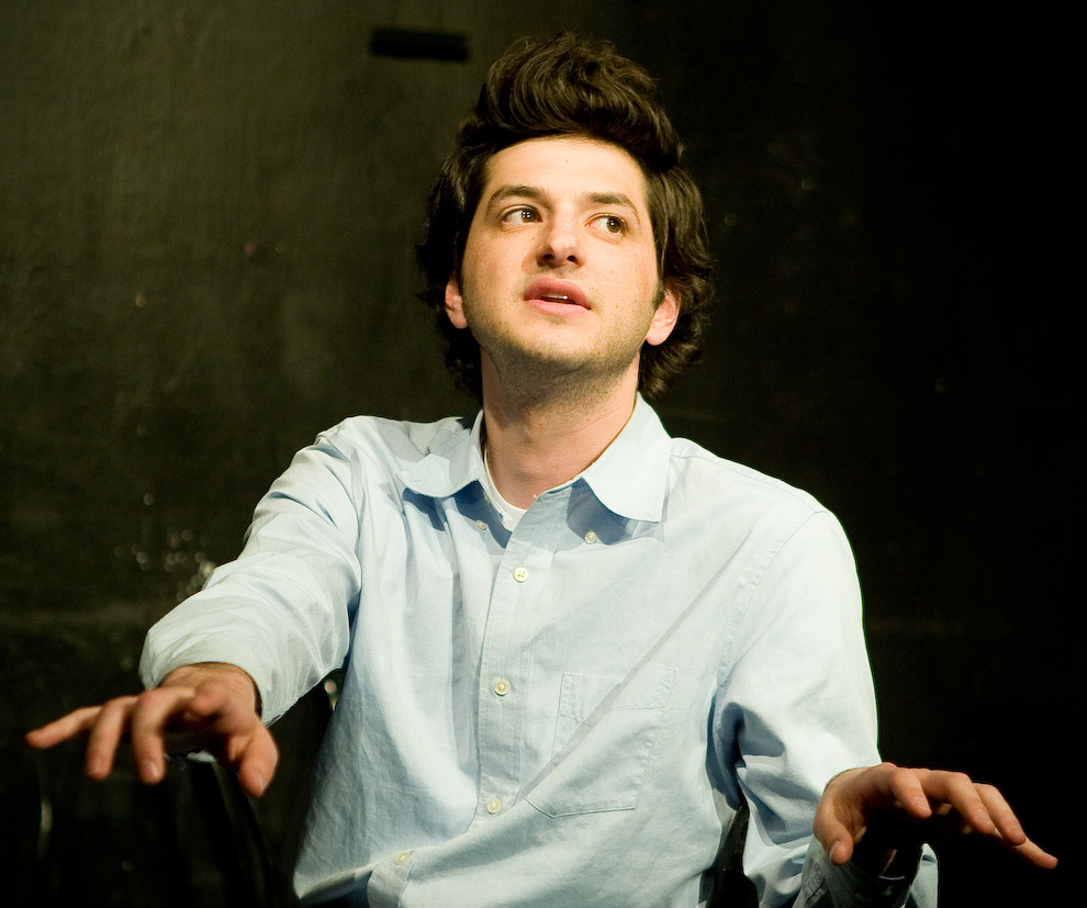 KILL SCREEN - UCB CAGEMATCH SNAPKIN VS KILL SCREEN